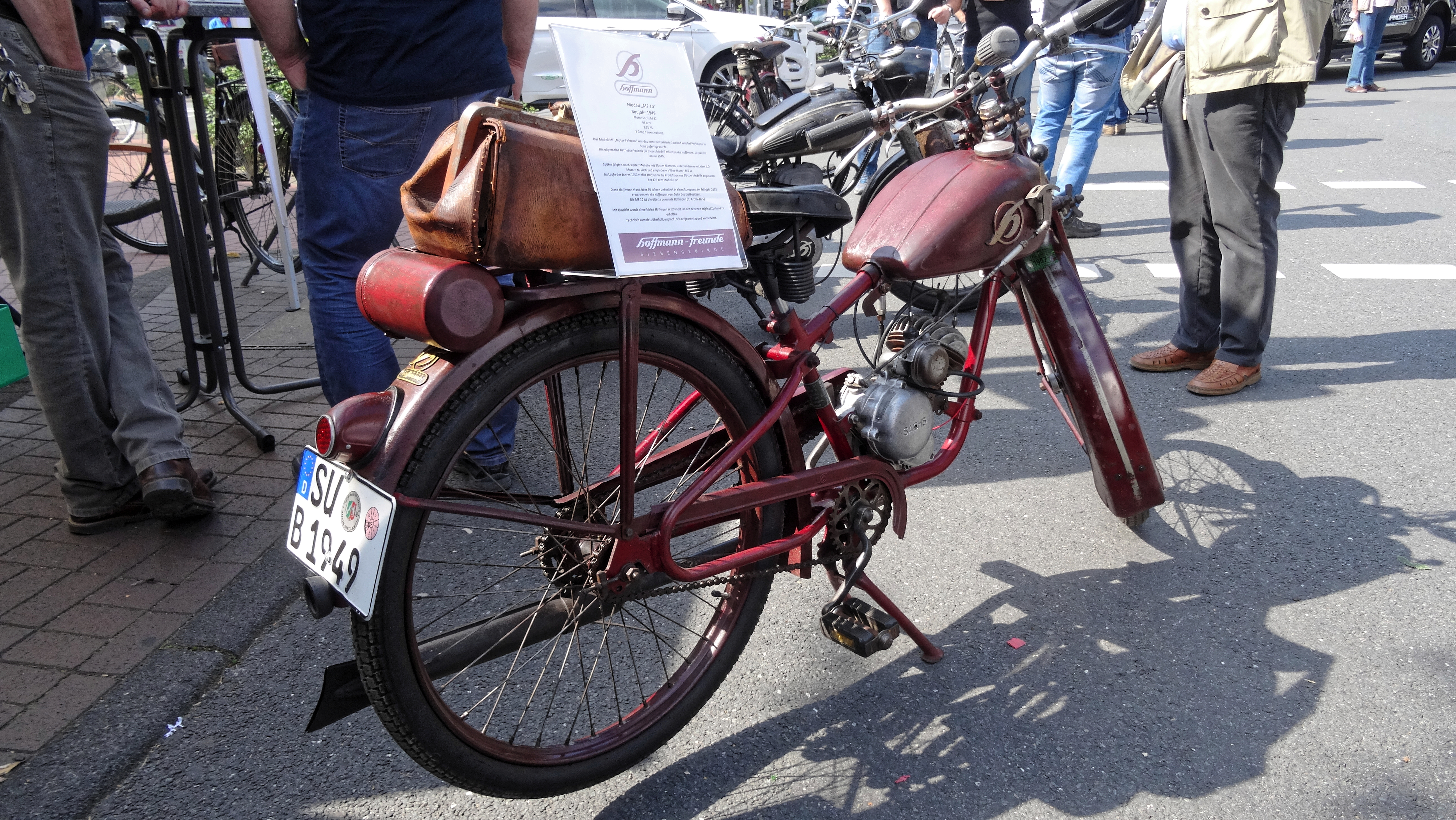 Motorfahrrad der Firma Hoffmann, Ratingen-Lintorf